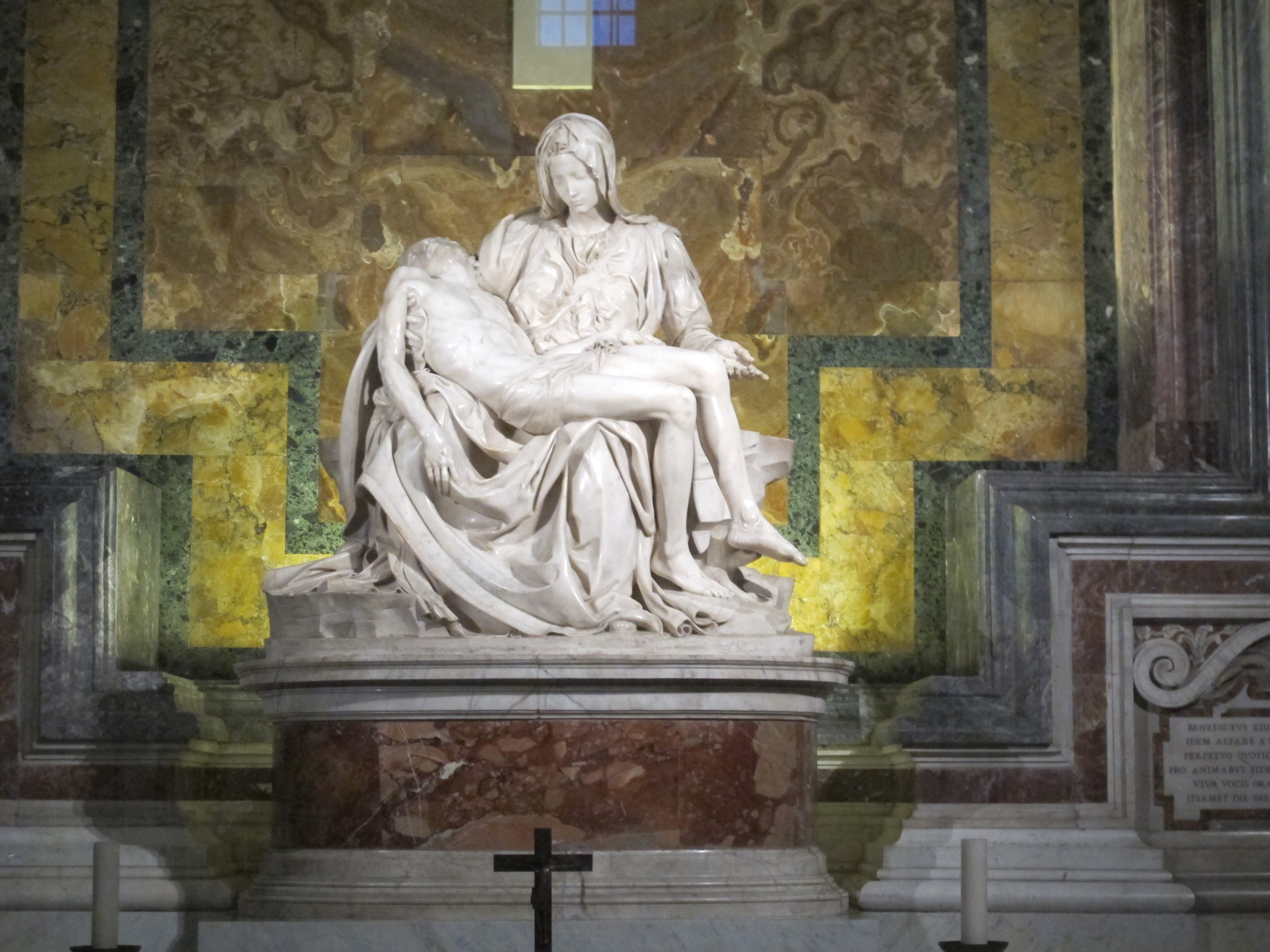 San pietro, pietà vaticana